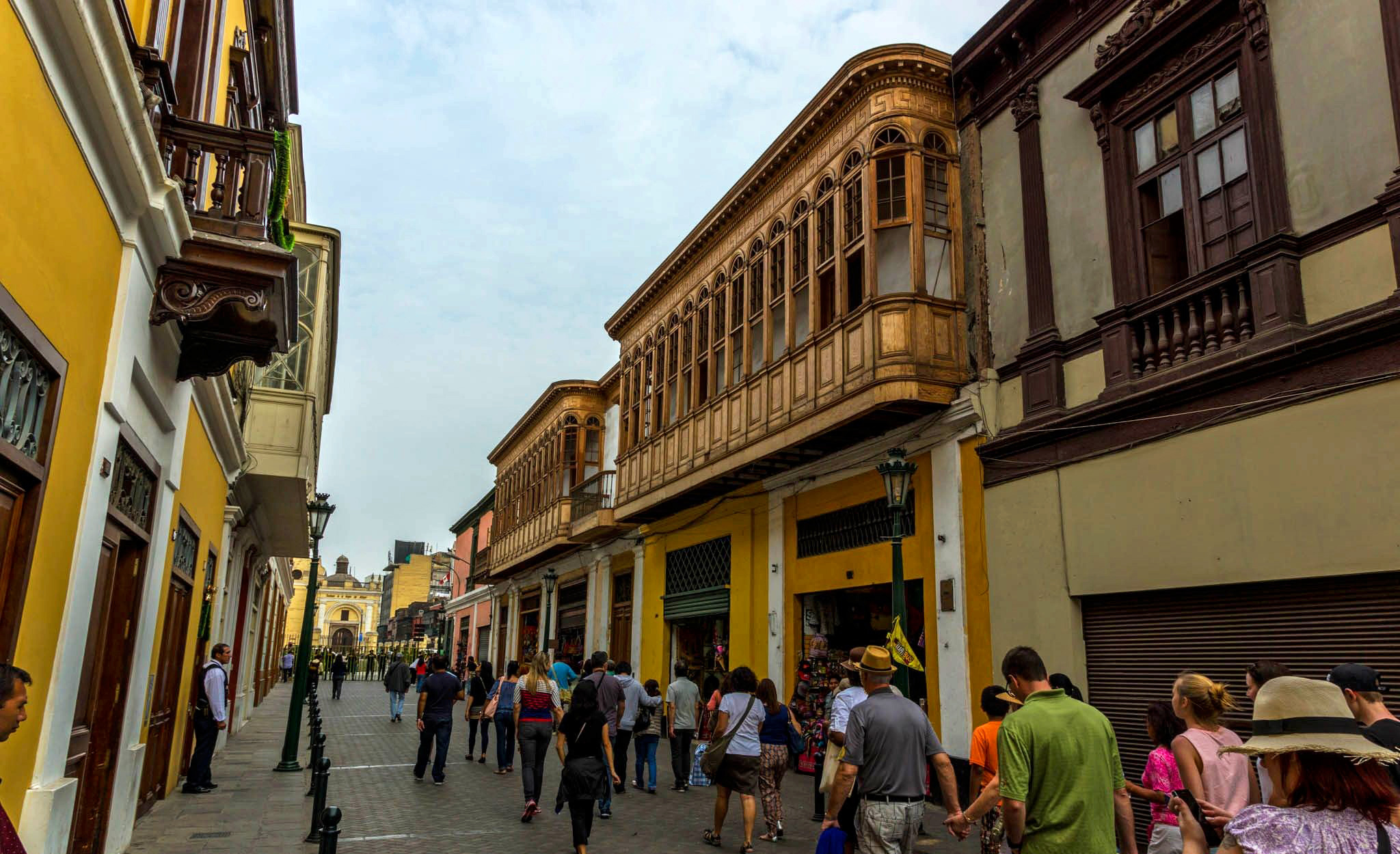 137_Lima_2014-2015